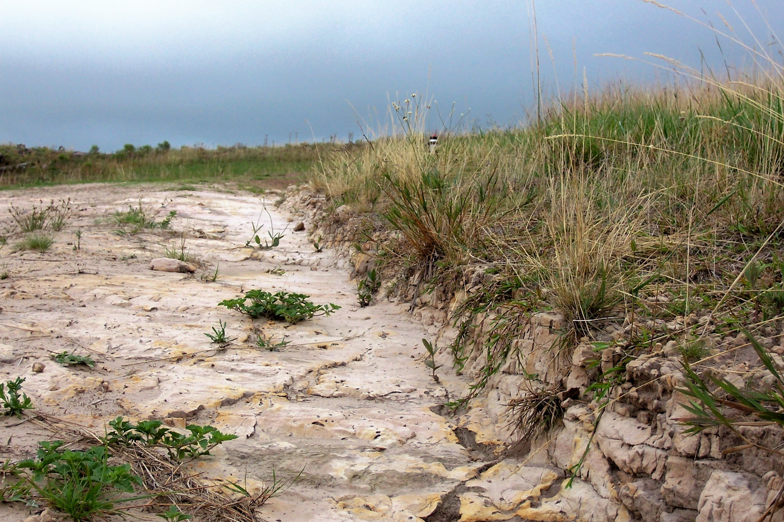 Vegetación sobre manto de areniscas, Balneario Iporá, departamento de Tacuarembó, Uruguay.